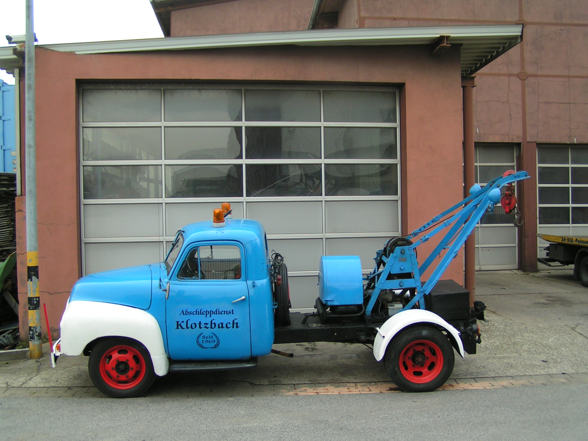 Historischer Abschleppwagen einer Bochumer Firma : Old towning Truck Source: own work Date: Feb 2007, Bochum, Germany Author: Maschinenjunge Licence: GFDL, cc-by 3.0 de: Abschleppfahrzeug